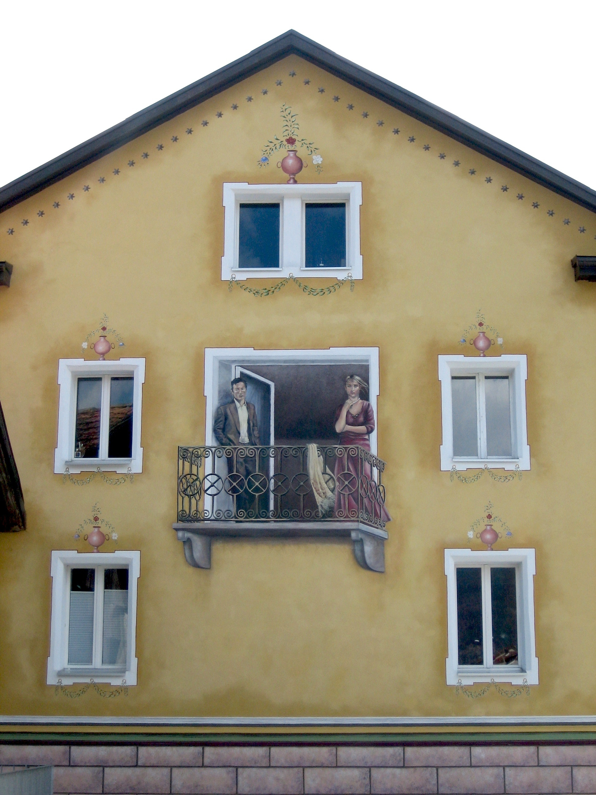 Illusion an einem Haus in Rhäzüns